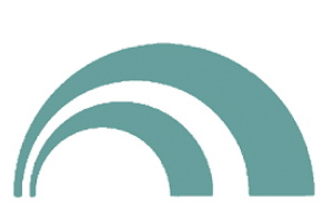 Logo du Metro de Karadj